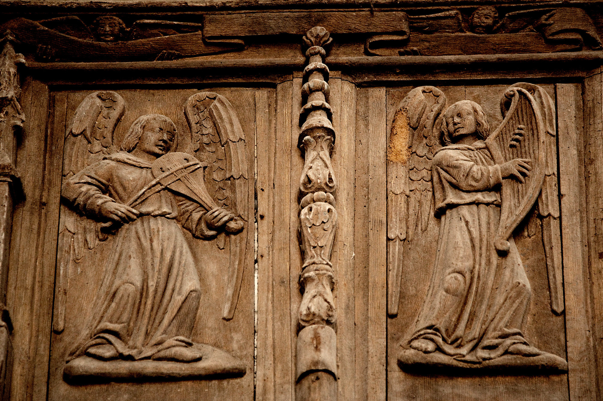 Anges musiciens jouant de la vièle à archet et de la harpe sculptés sur un retable à l'intérieur de la chapelle Sainte Barbe au Faouët (Bretagne)